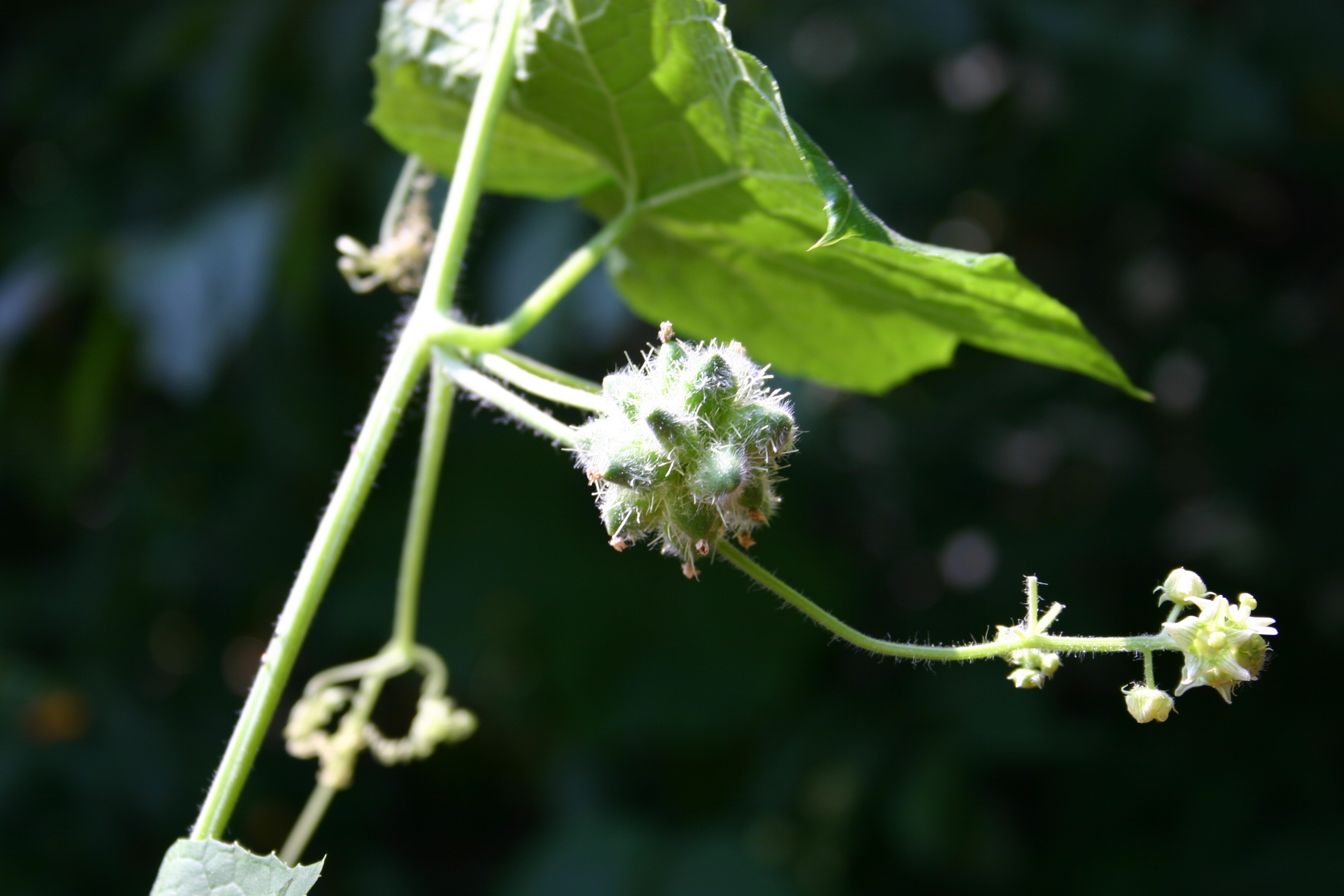 Sicyos angulatus